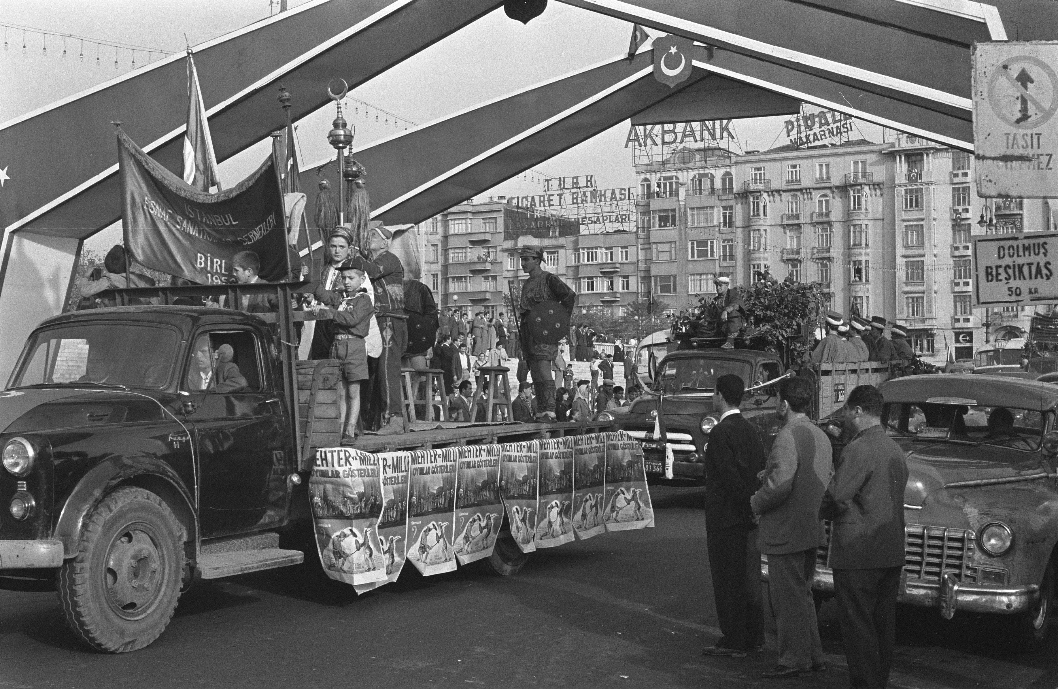 Collectie / Archief : Fotocollectie Anefo Reportage / Serie : [ onbekend ] Beschrijving : Vraagteken vlucht Lockheed Electra naar Istanbul Datum : 29 oktober 1959 Locatie : Istanboel Trefwoorden : steden Instellingsnaam : Lockheed Electra Fotograaf : Pot, Harry / Anefo Auteursrechthebbende : Nationaal Archief Materiaalsoort : Negatief (zwart/wit) Nummer archiefinventaris : bekijk toegang 2.24.01.05 Bestanddeelnummer : 910-7809